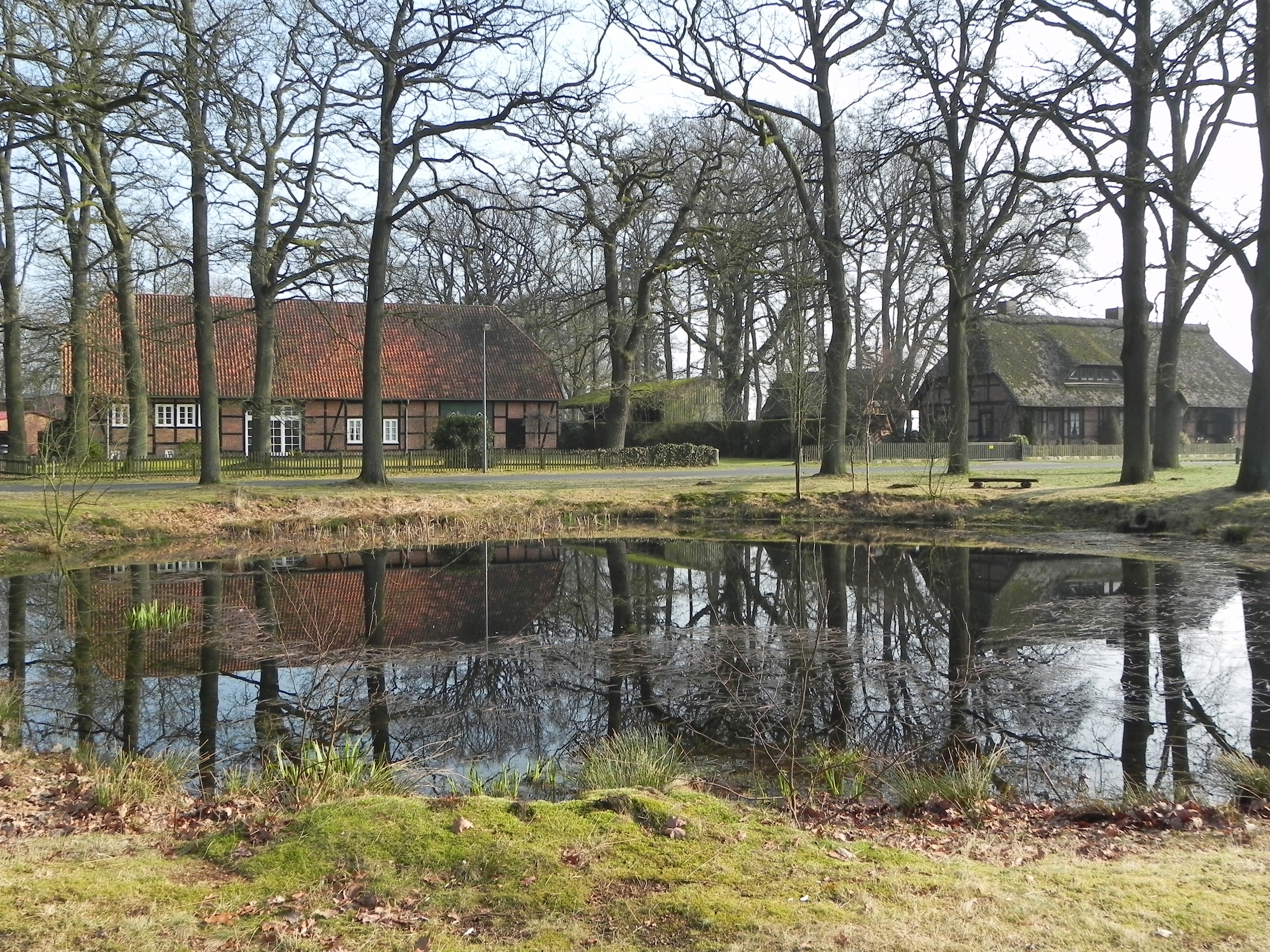 Bauernhäuser am alten Dorfteich in Offen (Bergen), Landkreis Celle